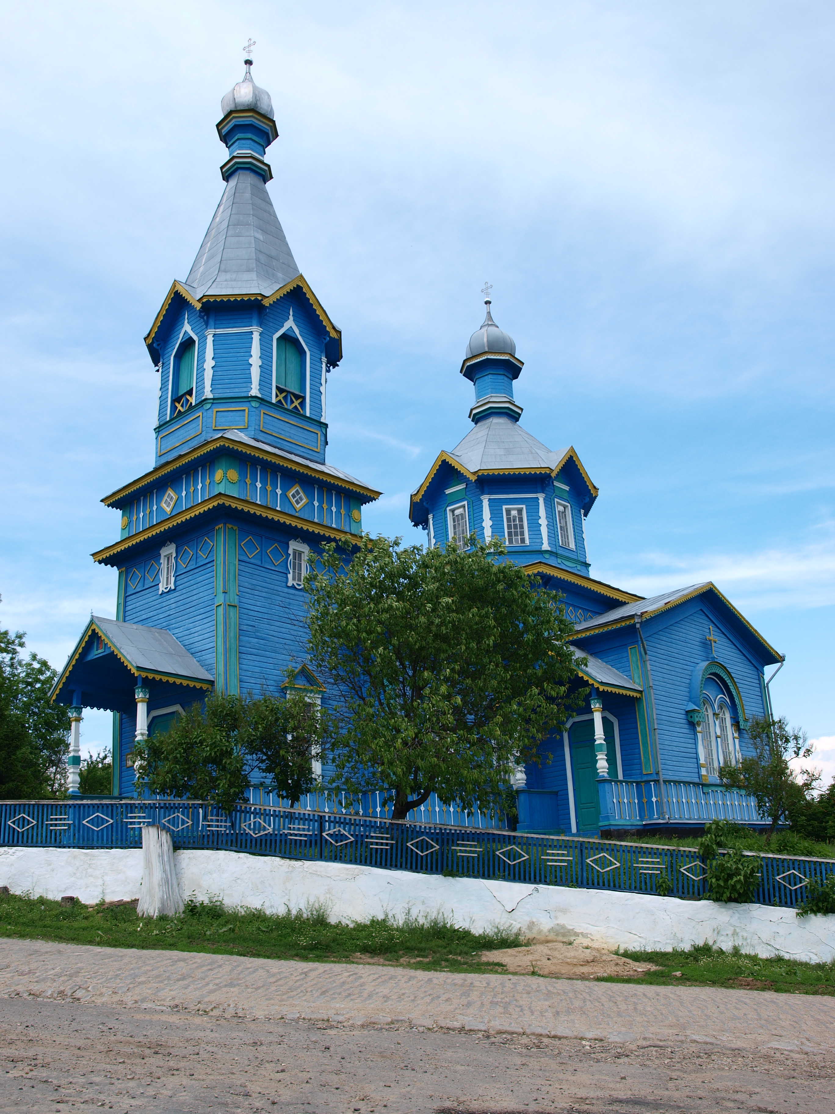 Украина, Винницкая область, Могилёв-Подольский район, село Кричановка. Свято-Михайловская церковь. Построена 1913-1918 гг, дерево. Посвящена 1919-05-09.